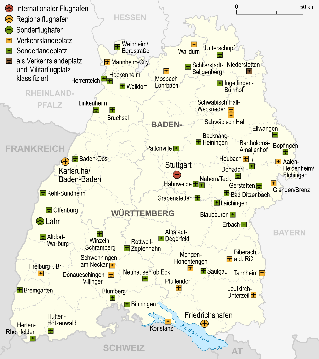 Flughäfen, Verkehrslandeplätze und Sonderlandeplätze in Baden-Württemberg, Stand 2007